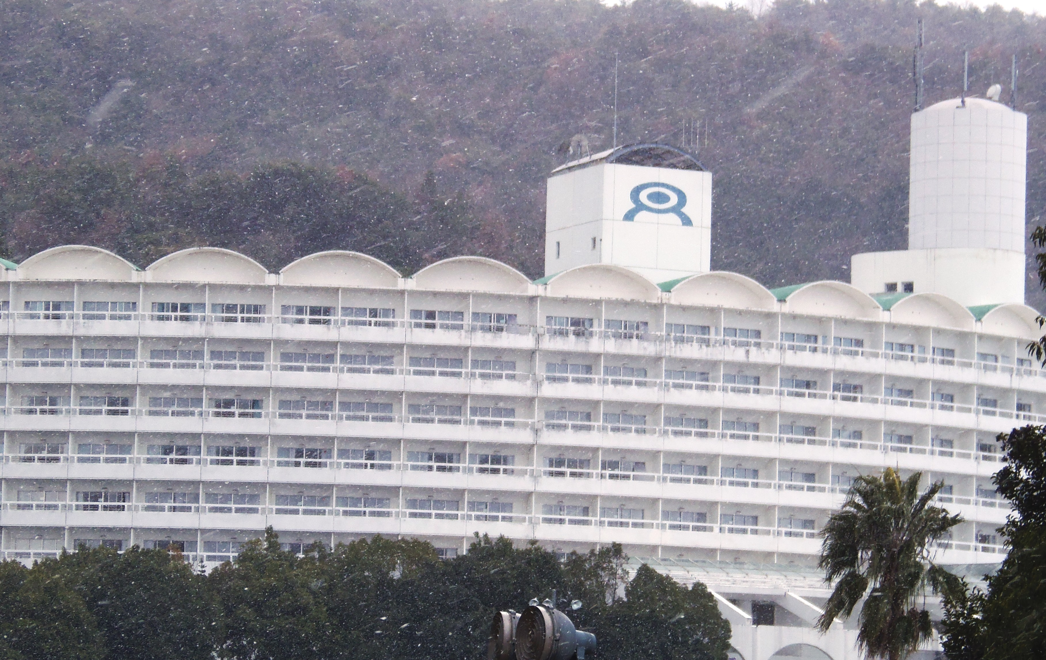 香川県丸亀市綾歌町にあるNEWレオマワールドのオフィシャルホテル「ホテルレオマの森」